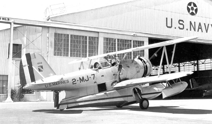 J2F-4oak2MJ7